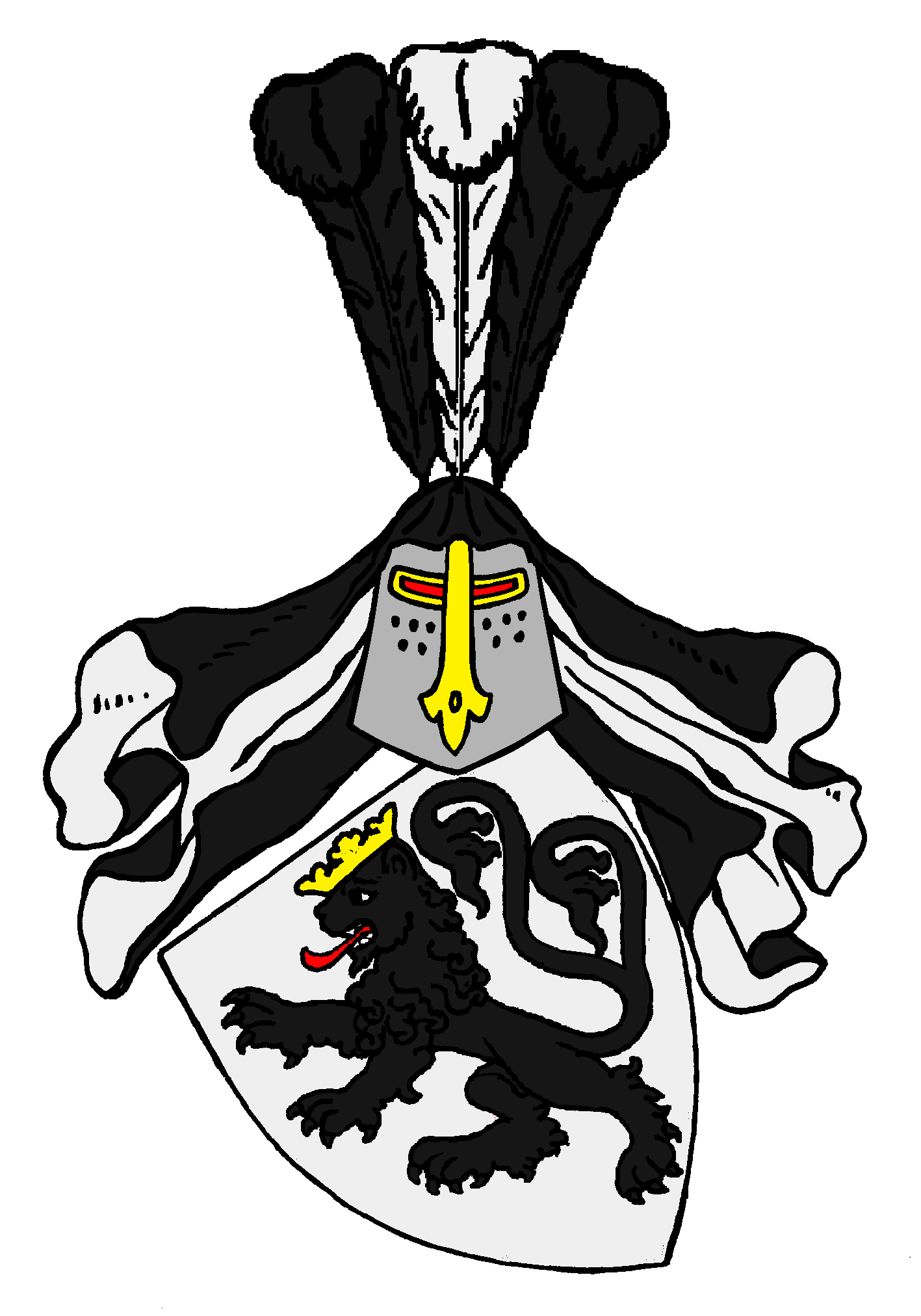 Stammwappen der von Tüllstedt genannt Strantz. Stammreihe urkundlich seit 1120, edelfreies thüringisches Geschlecht, Burggrafen zu Leisnig, seit 1210 genannt Strantz. Heute blüht nur noch die märkische Linie, beginnend mit Hermann dictus Strantz 1325. Bis zum 18. Jahrhundert im Kreis Lebus schlossgesessen, dann in der Neumark, in Pommern, Westpreußen und Schlesien.